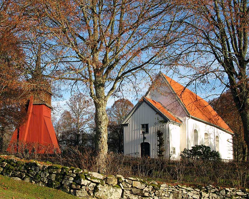 Sandseryds kyrka, Jönköpings län